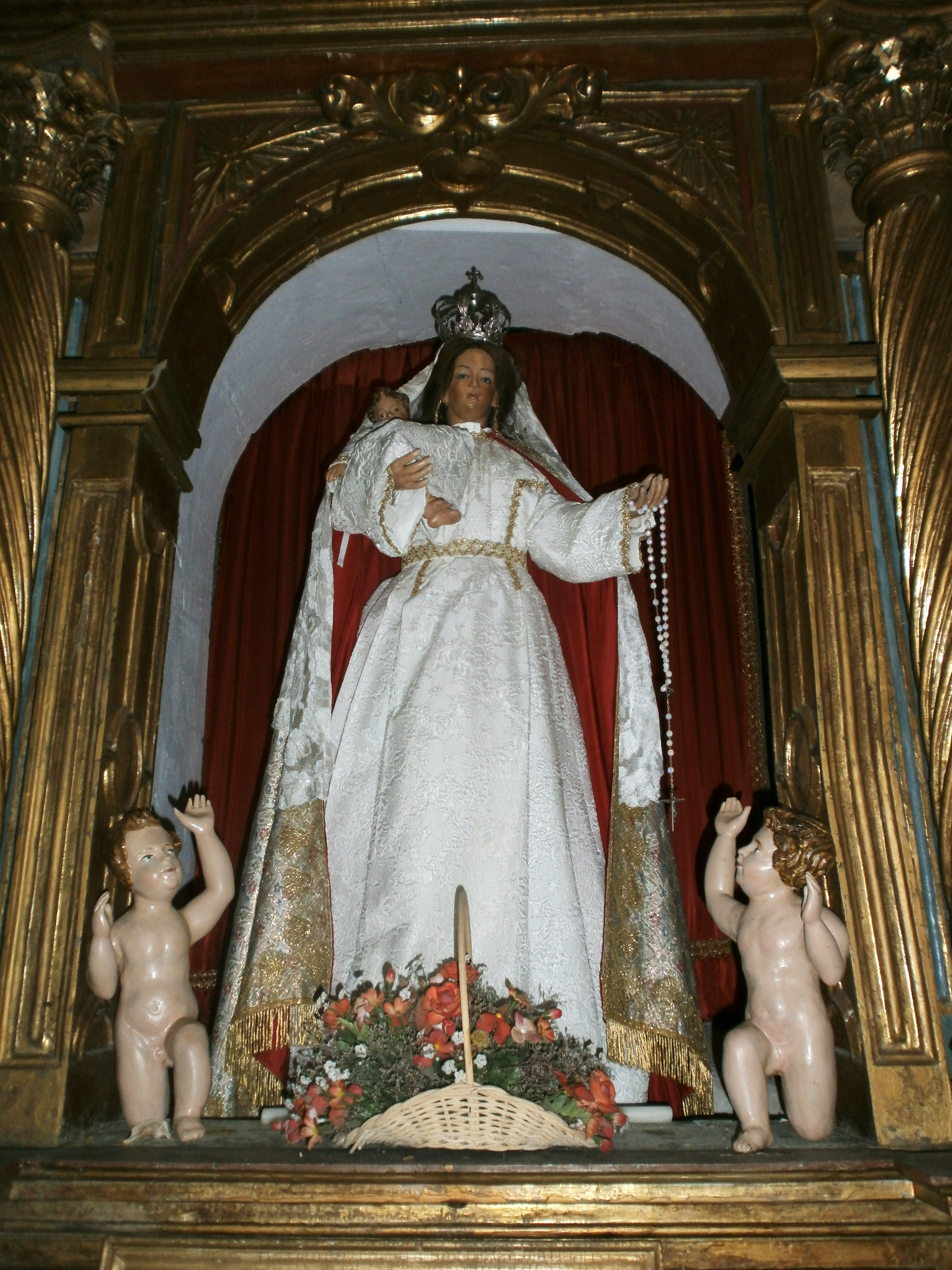 Camarín de la Virgen de Bendueños que preside el altar mayor.